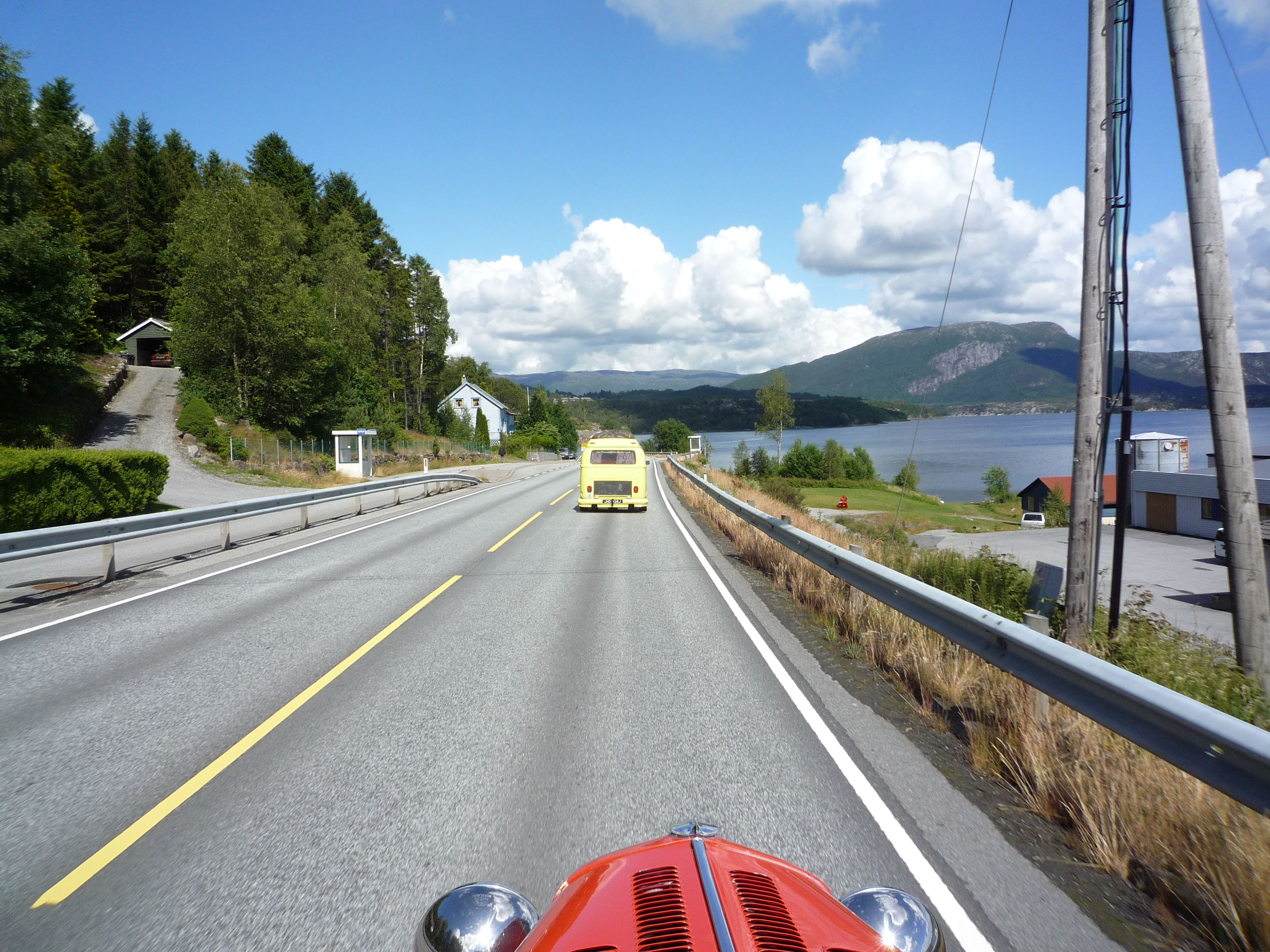 E134 ved Skjold i Vindafjord